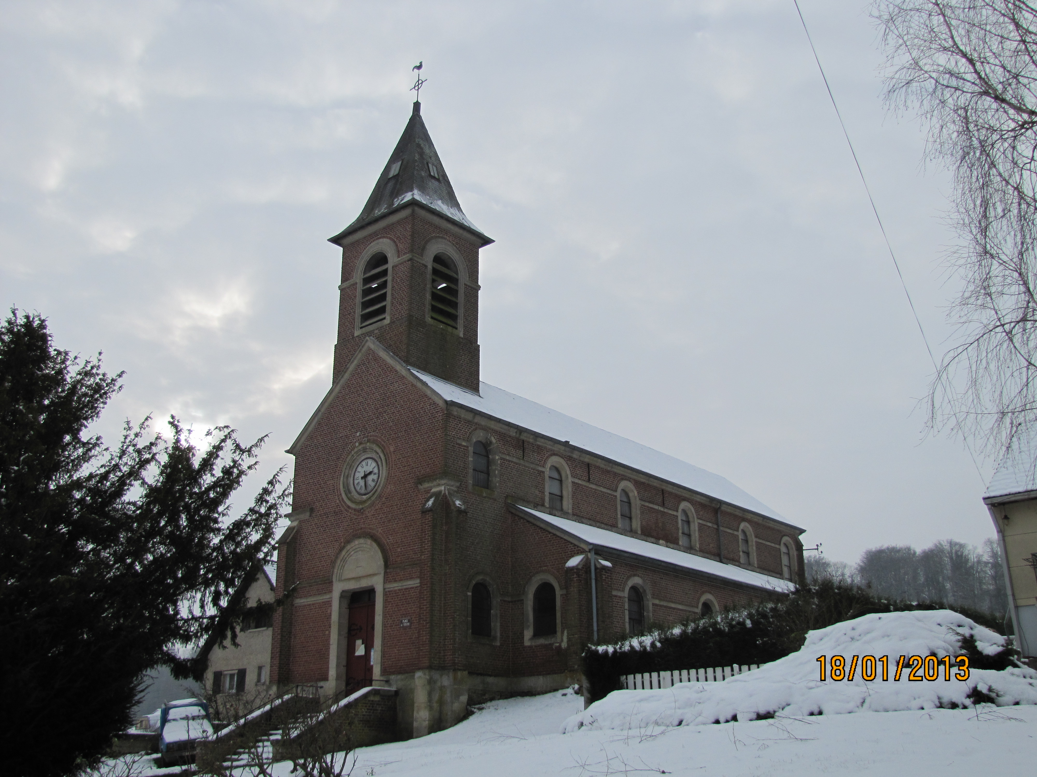 Eglise du village prise de la rue principale.